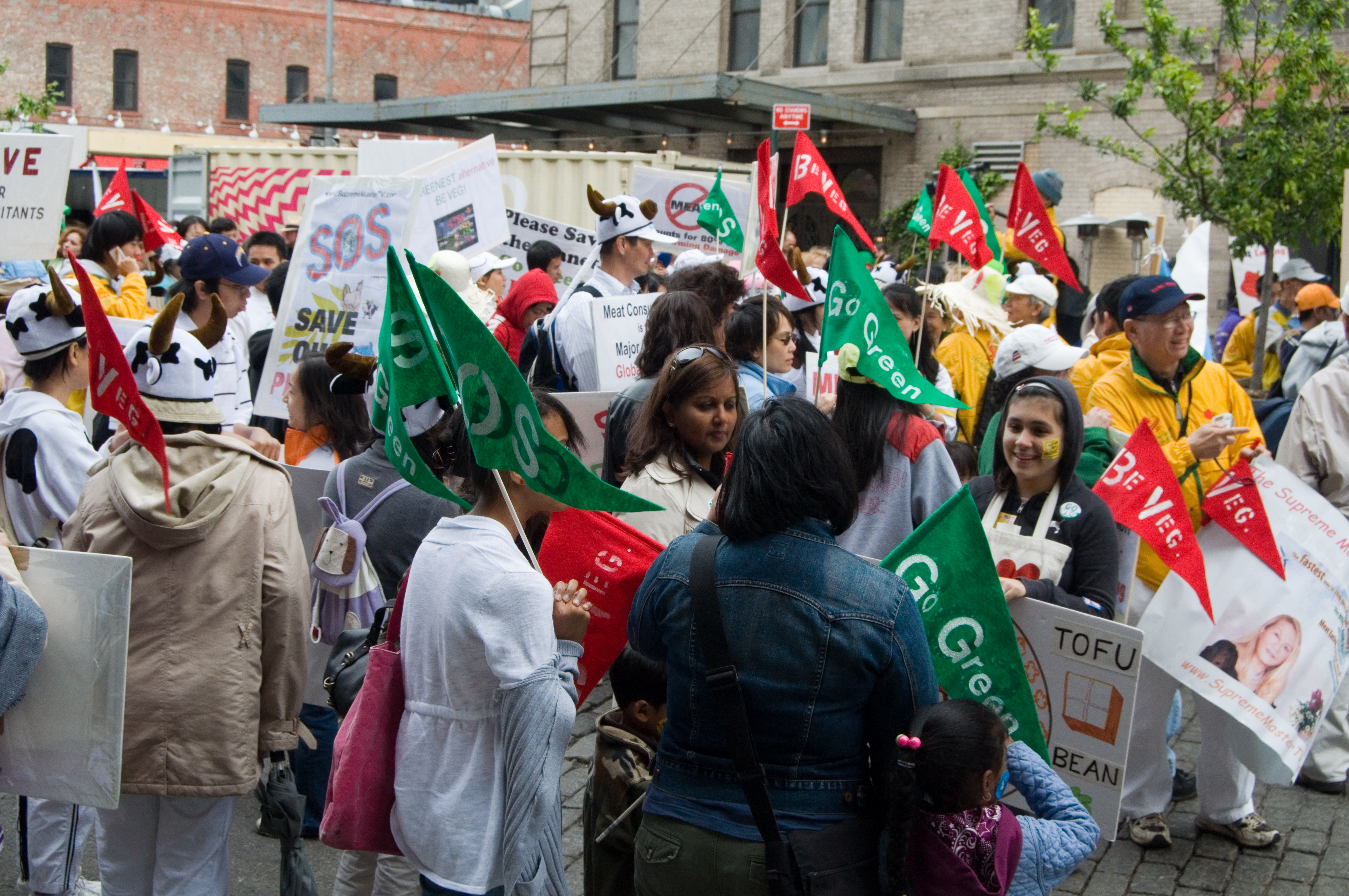 Veggie Pride Parade 2009 Article in NY Times here